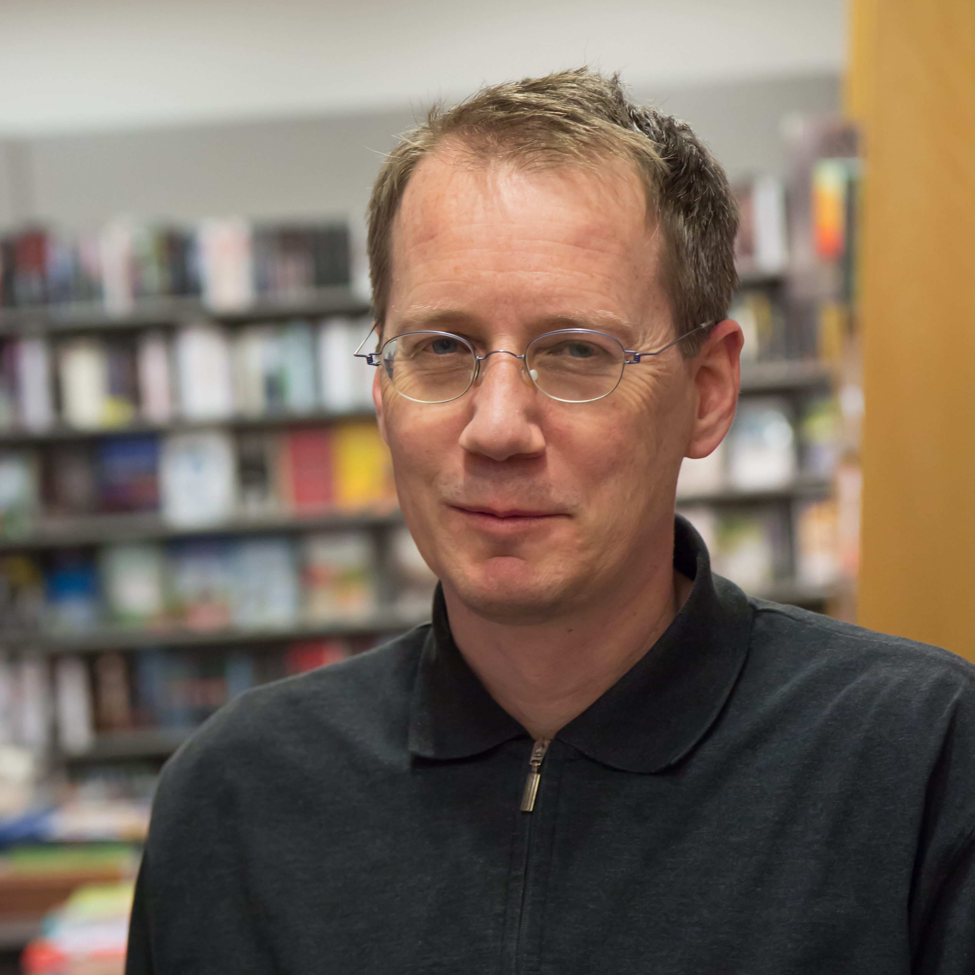 Der Schriftsteller Christoph Poschenrieder in der Offenburger Buchhandlung Roth anlässlich der Offenburger Literaturtage